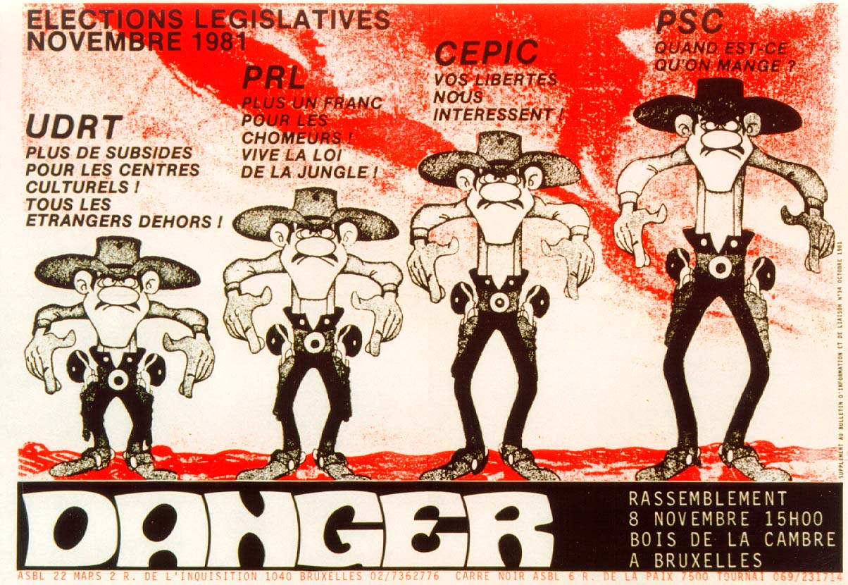 affiche ASBL 22 mars